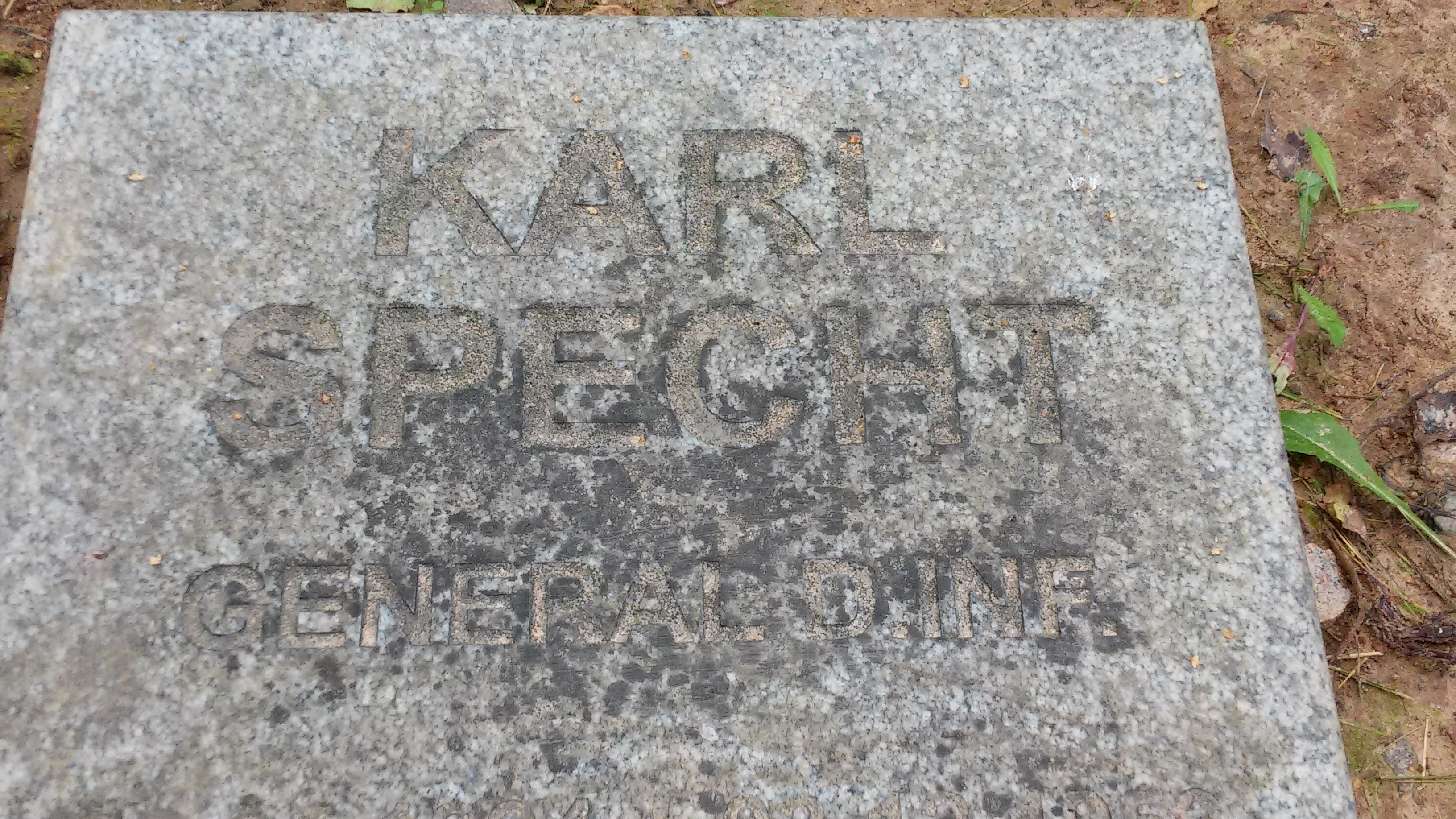 Tombstone; Cherntsy Memorial